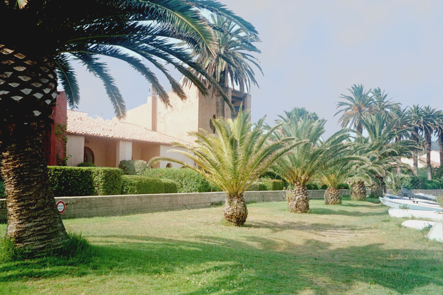 Strand zu Porquerolles